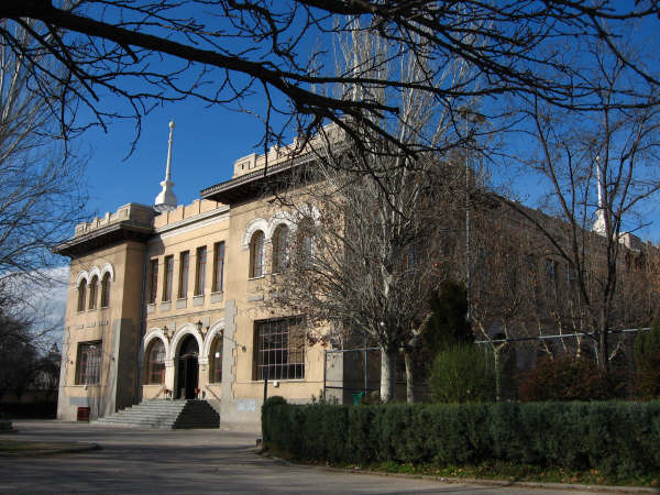 La sección Retiro de Bachillerato del Instituto-Escuela, actual instituto Isabel la Católica de Madrid